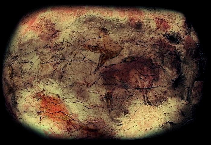 Réplica del techo de la cueva de Altamira, expuesta en los jardines del Museo Arqueológico Nacional de España